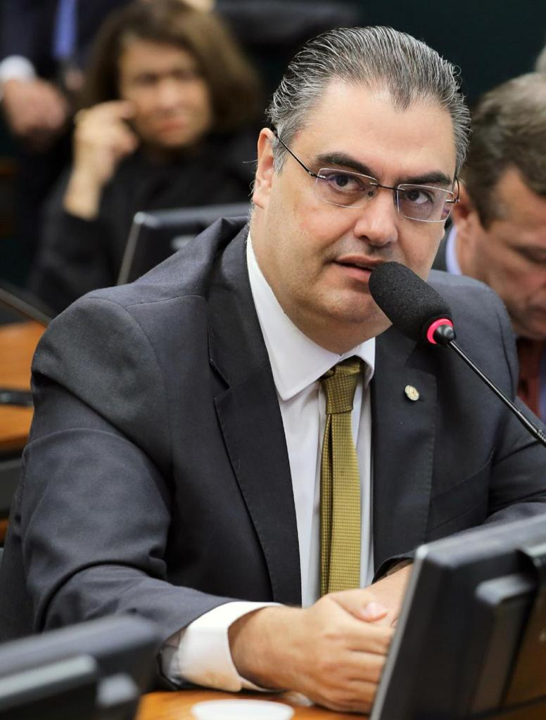 Deputado Lafayette de Andrada